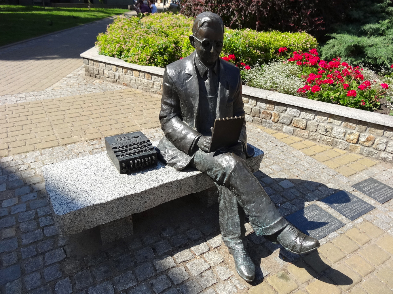 "Ławeczka Mariana Rejewskiego" (autor Michał Kubiak 2005), pogromcy niemieckiej Enigmy, na ulicy Gdańskiej w Bydgoszczy